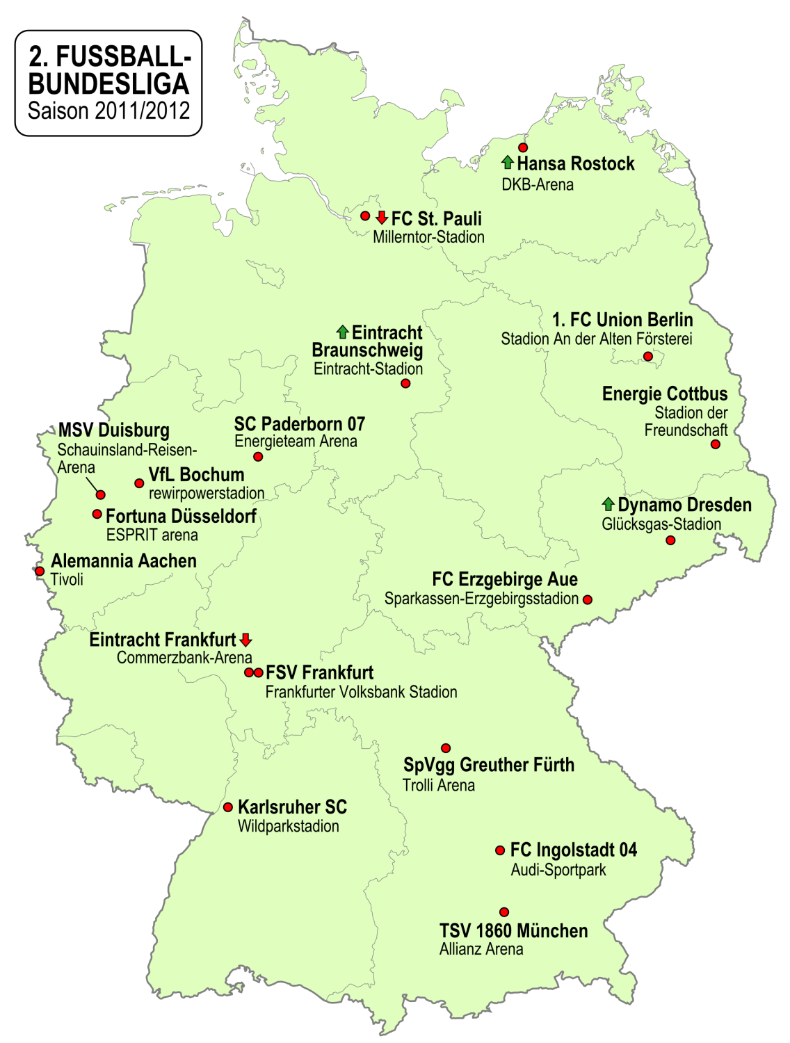 Karte der Vereine der 2. Fußball-Bundesliga-Saison 2011/2012